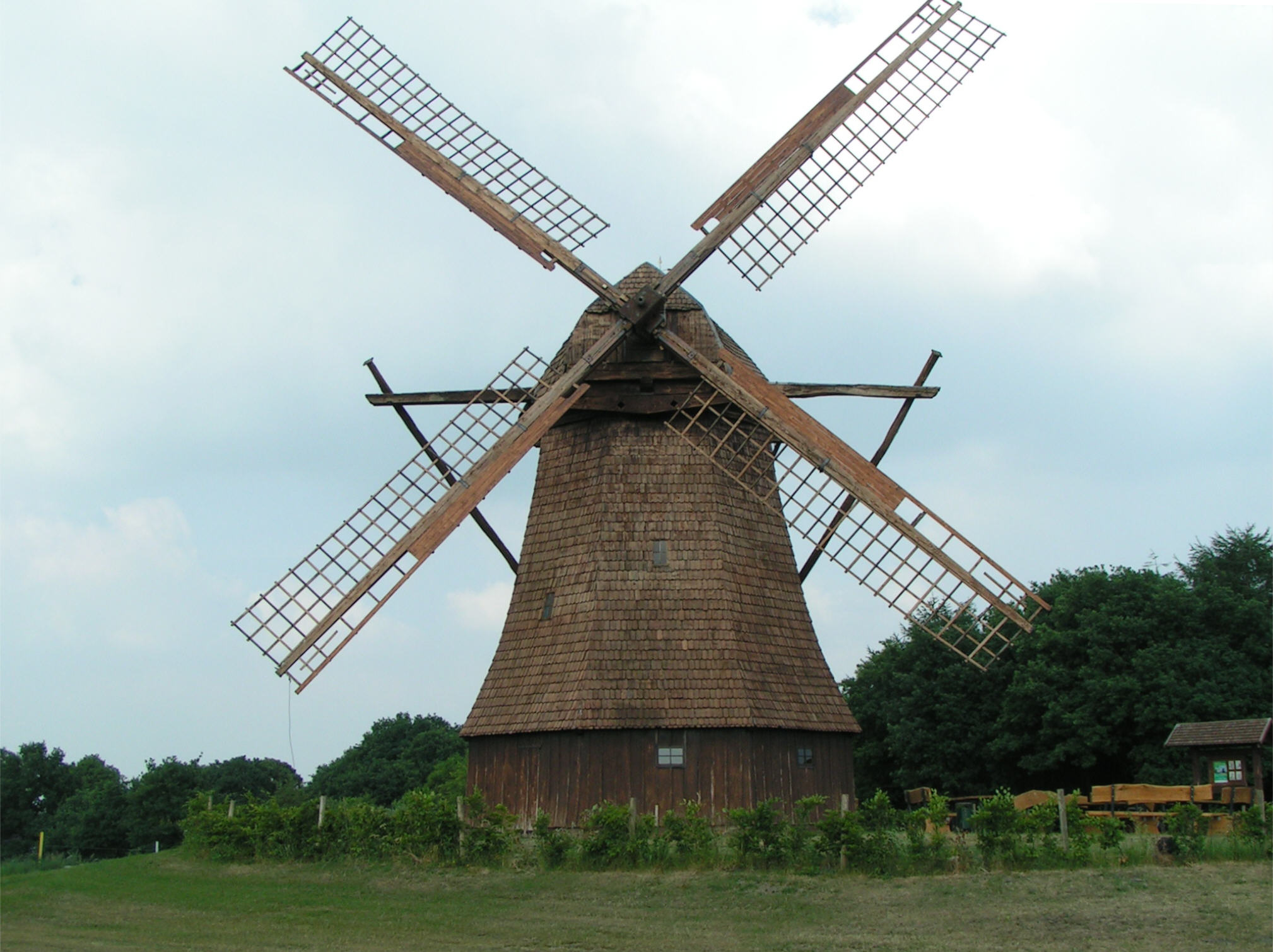 Windmühle Gehlenberg (Gemeinde Friesoythe, Erdholländer)